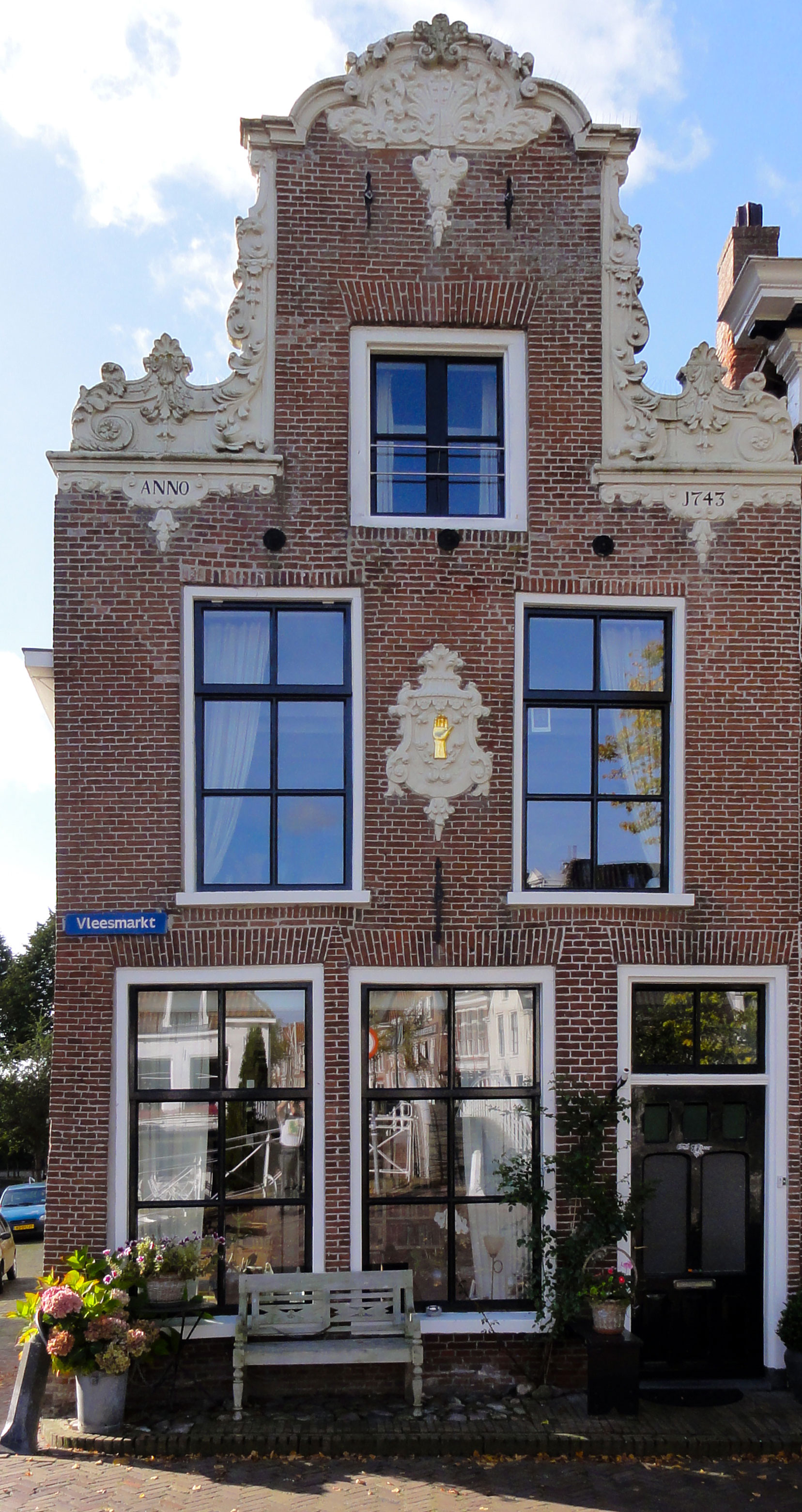 Vleesmarkt 33 Dokkum, rijksmonument